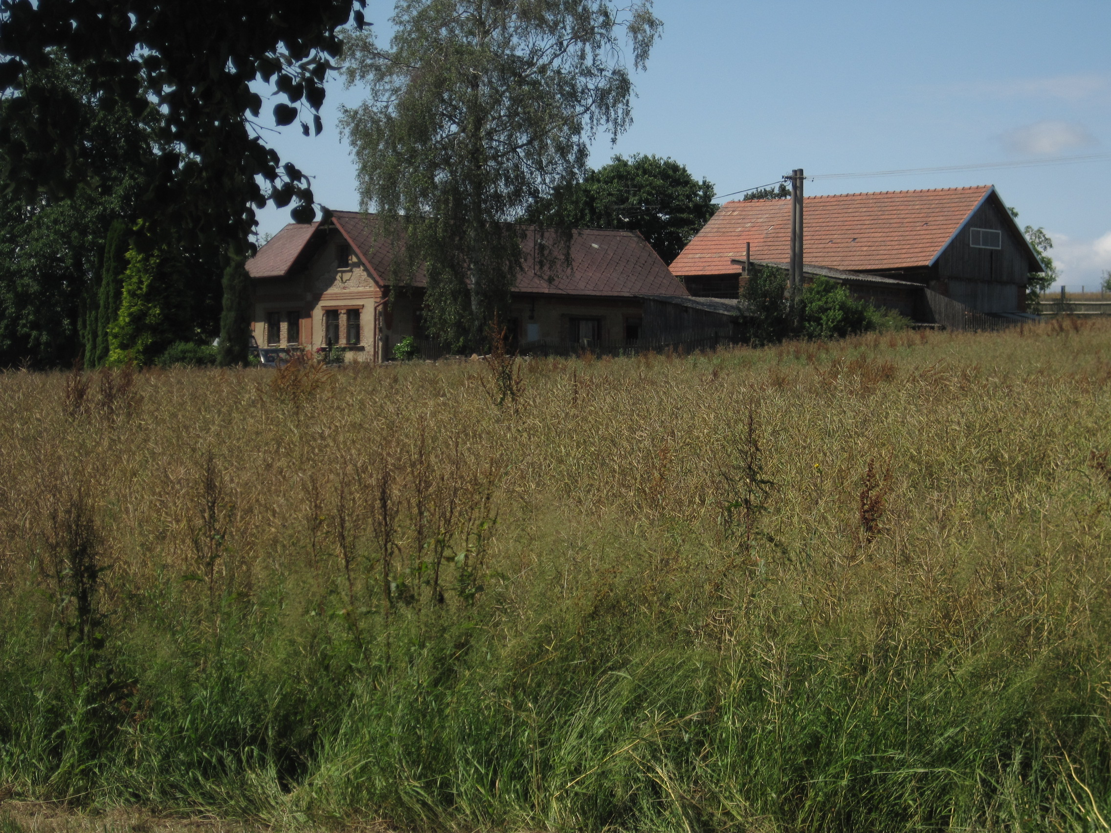 Zajakury - statek čp. 18